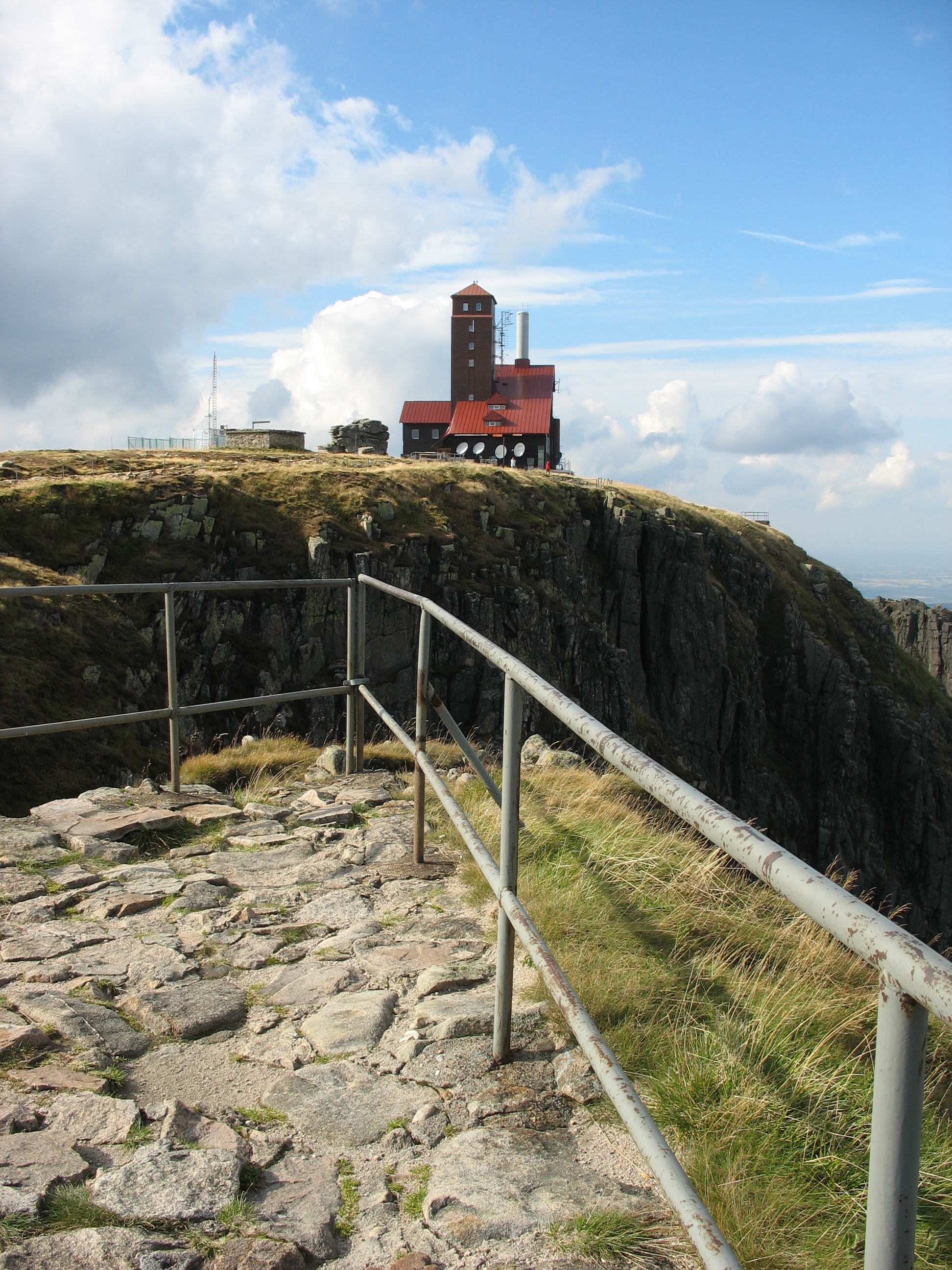 Sněžné jámy